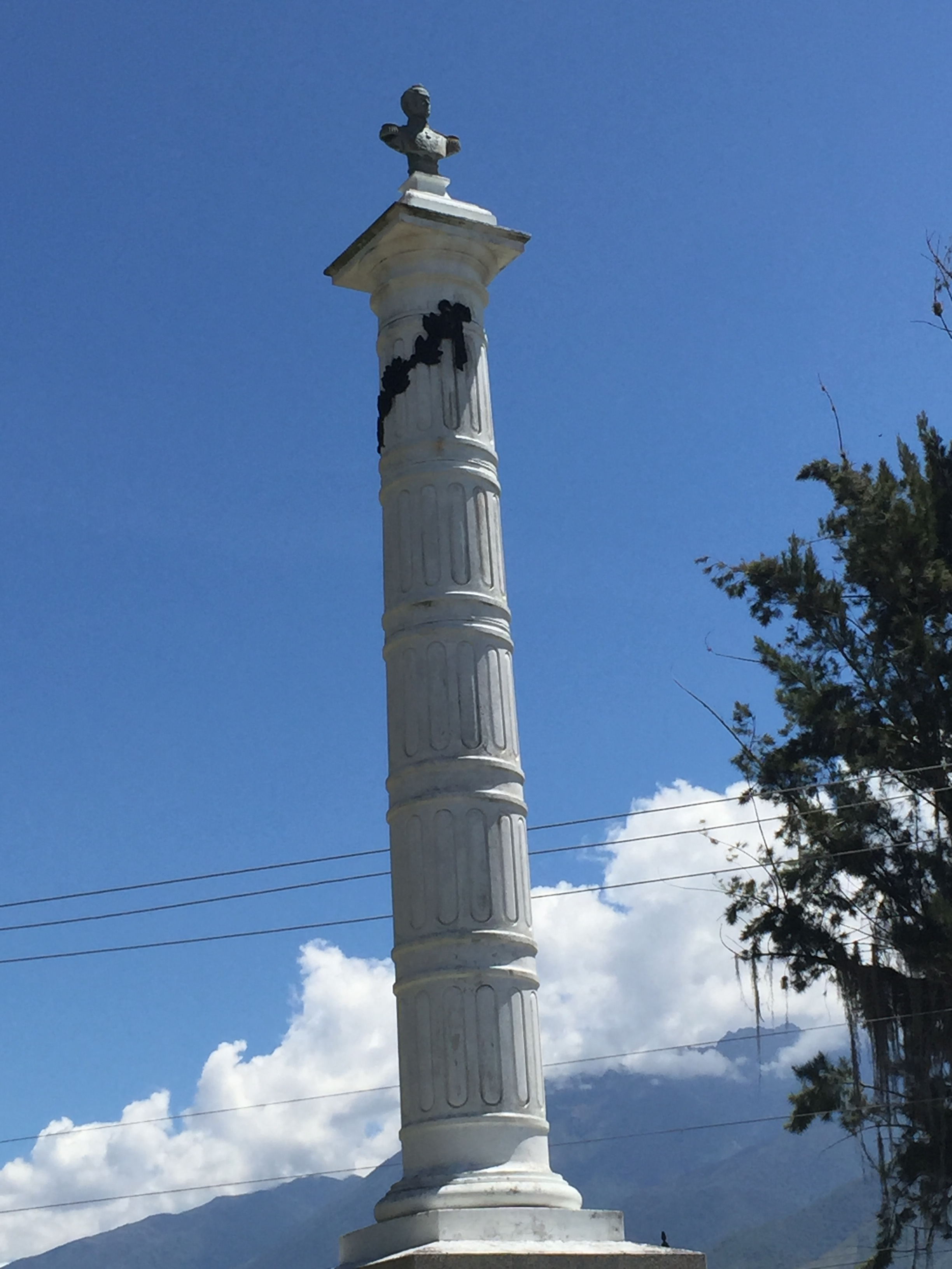 La Columna de Bolívar fue el primer monumento dedicado a Simón Bolívar en el mundo, data de 1842. Se encuentra en el Parque de las Cinco Repúblicas, en la ciudad de Mérida.